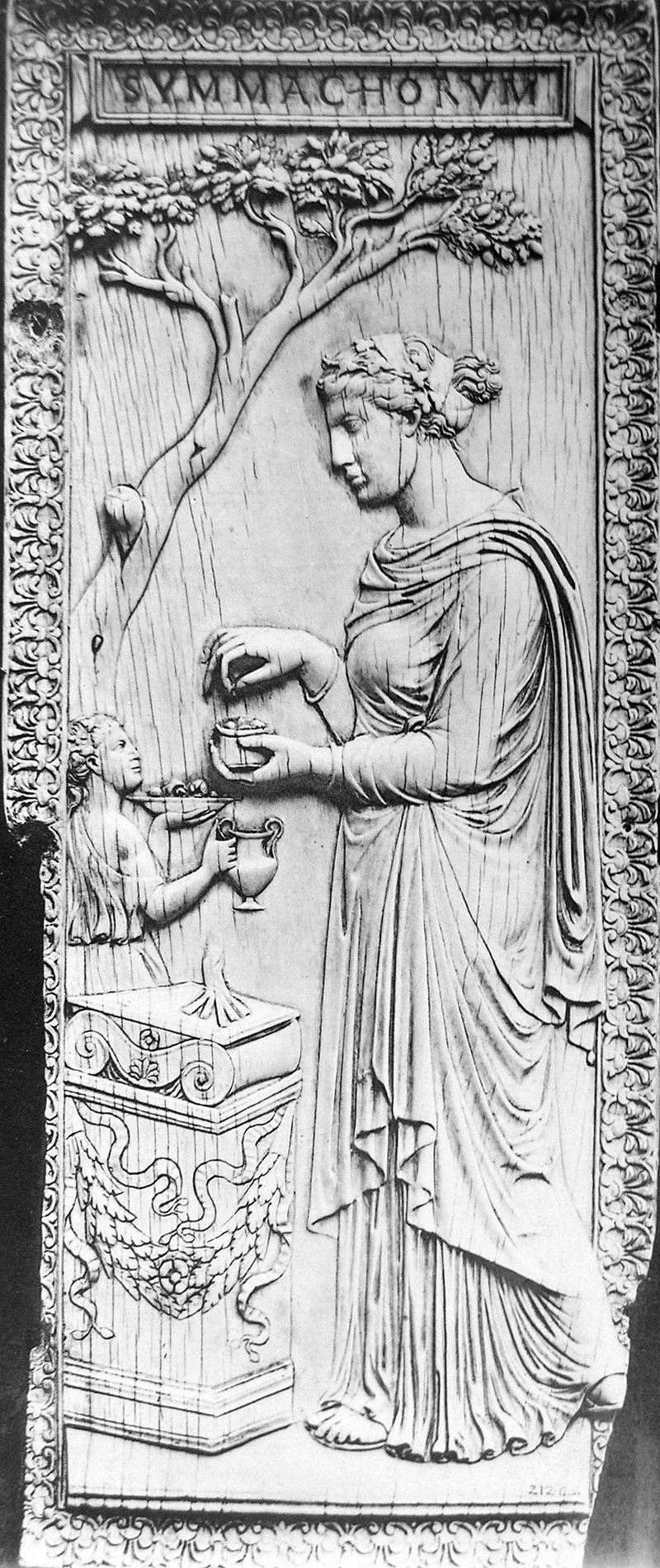 Fluegel eines Elfenbeidiptychons (Hoehe: 29,9 cm), der Panel wurde im 7. Jh. als Teil eines Schreines des Bercharius in einem Kloster in Montier-en-Der (Frankreich) benutzt. Er befindet sich nun in London, Victoria und Albert Museum. Inv. Nr. 212-1865. Auf der Tafel befinde sich die die Inschrift "Symmachorum". Atrribute sind Eiche und Altar, die zum Jupiterkult gehoeren.